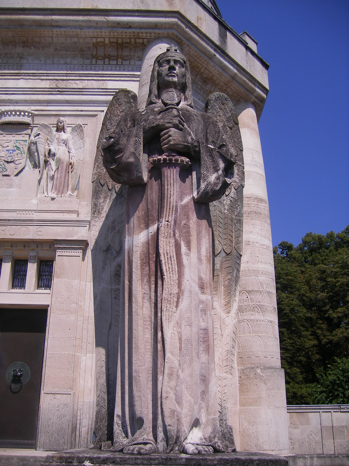 Krasznahorkaváralja - Andrássy-mauzóleum